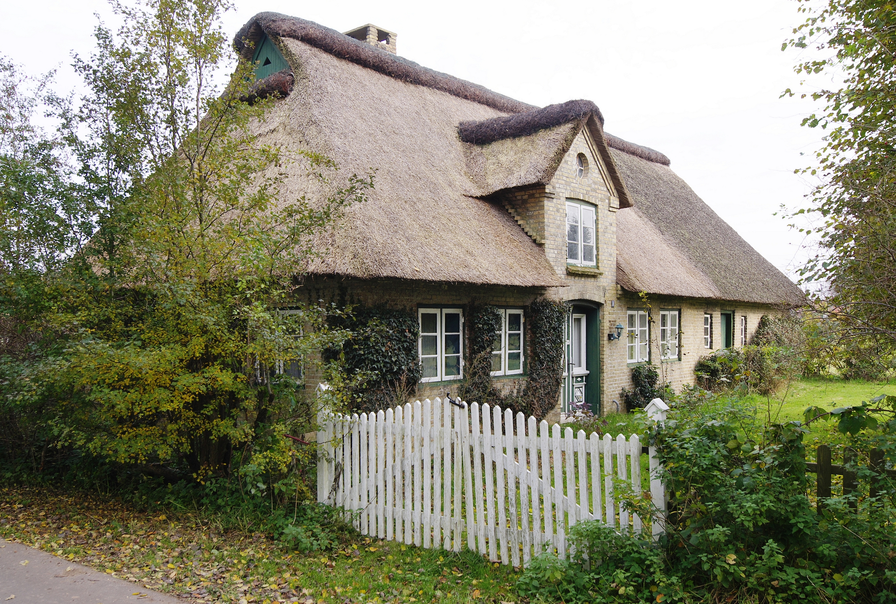 Denkmalgeschütztes Gebäude in Hollingstedt. Ehemaliges Müllerwohnhaus